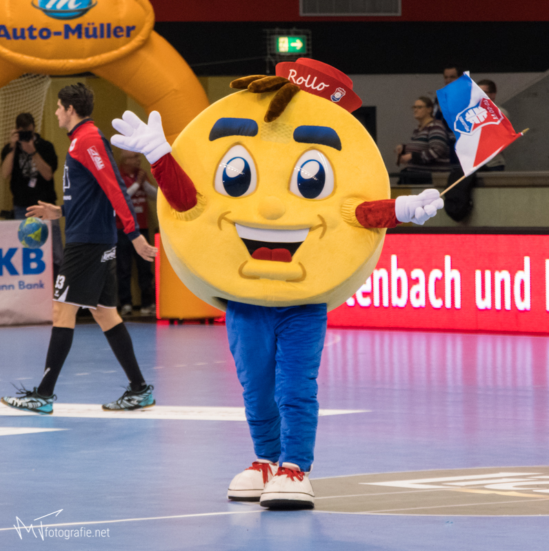 Das neue Maskottchen des TV 05/07 Hüttenberg